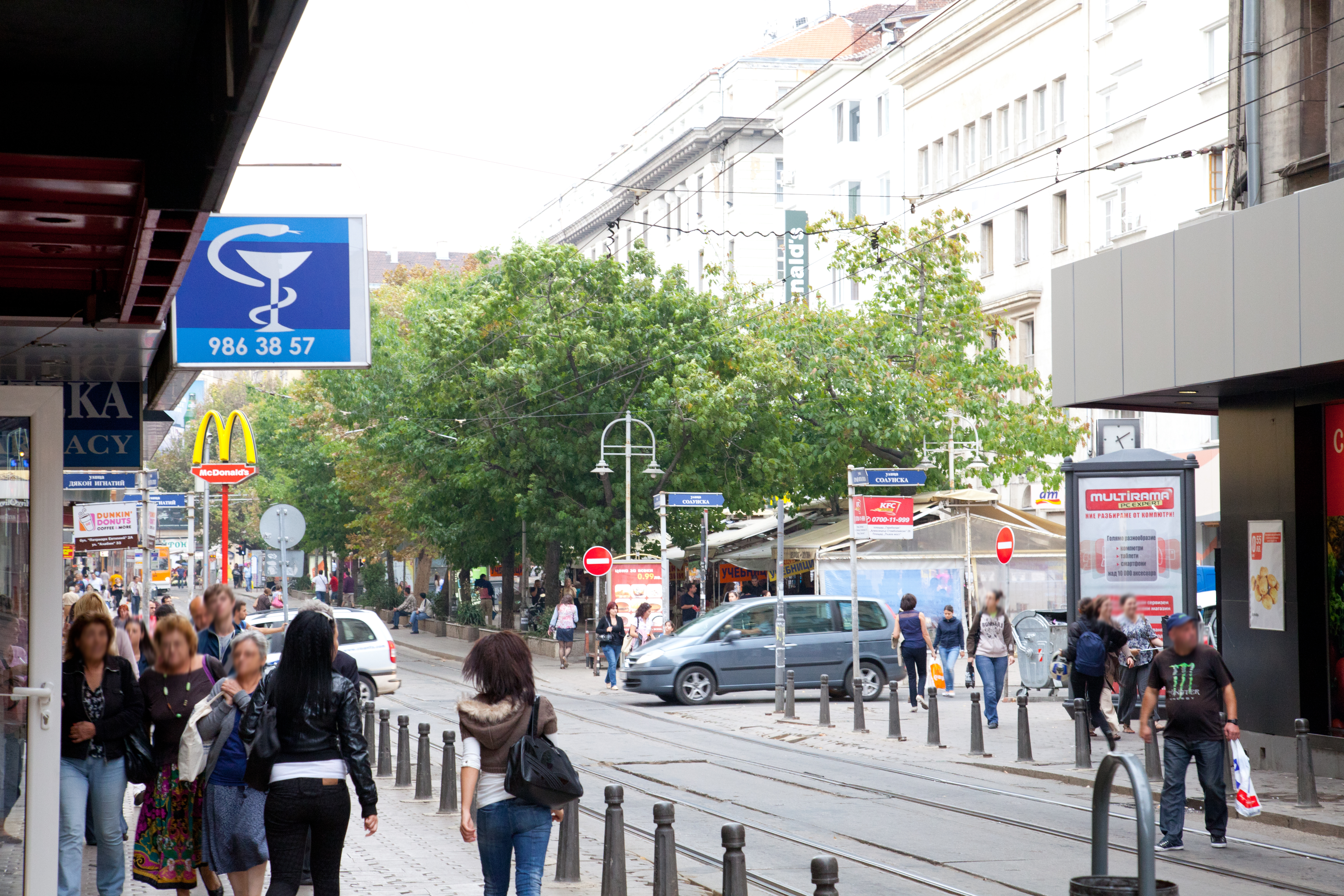 Sofia; Platz: Slaveykov